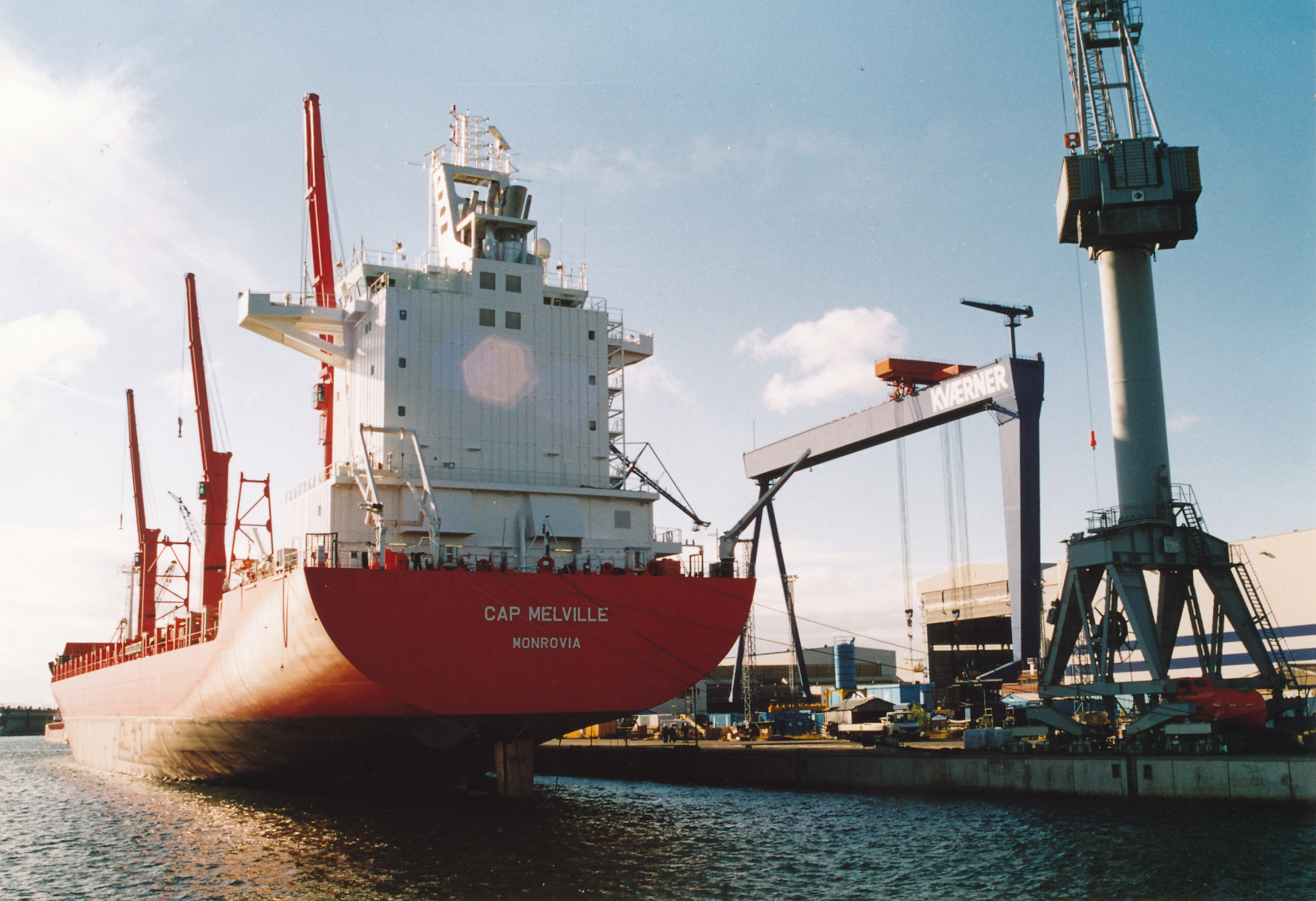 Werftanlage Warnemünde/Rostock Datum: 20.10.2003 Urheber: Michael Pfeiffer Quelle: privates Fotoalbum des Urhebers